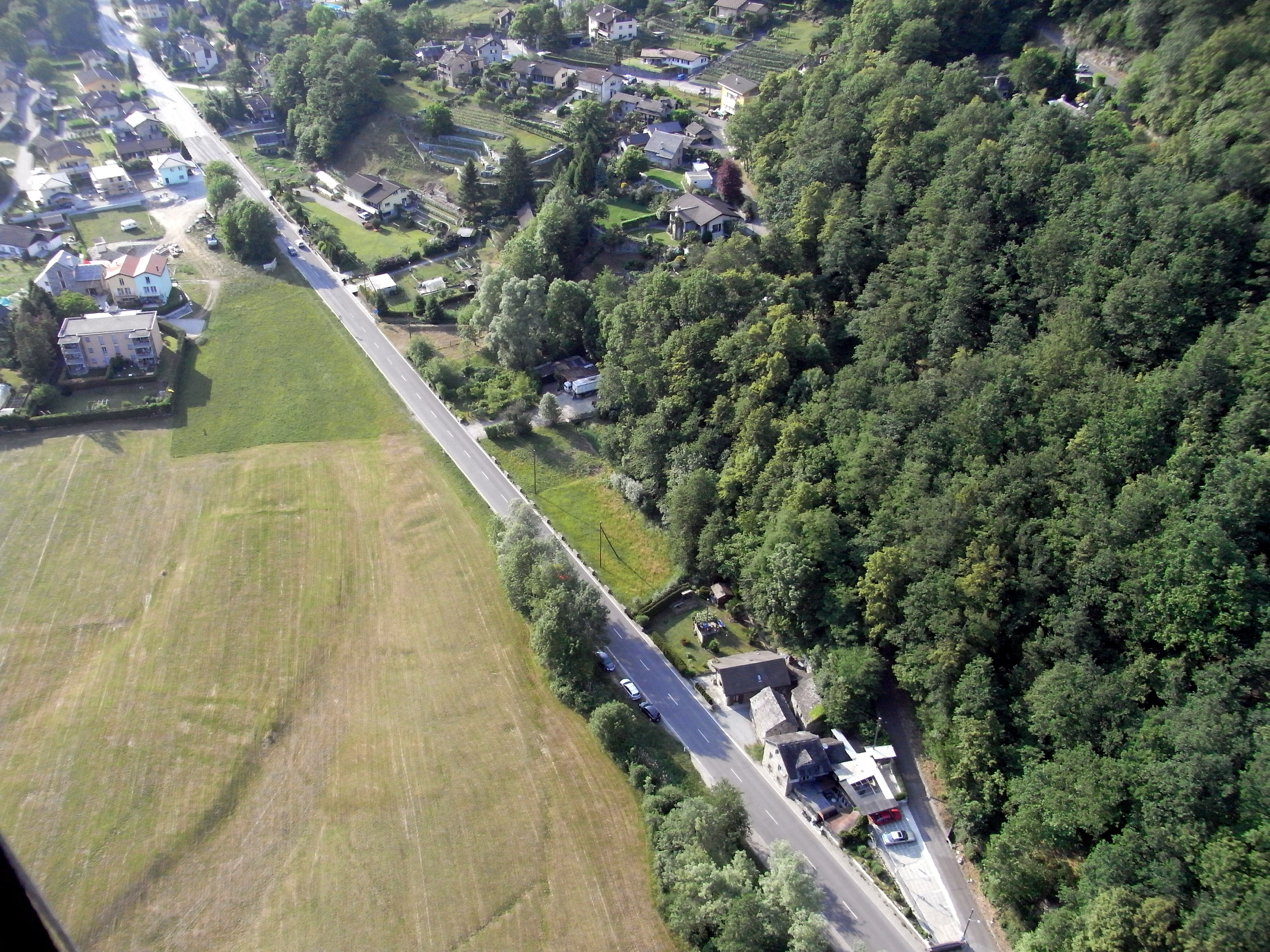 Ronchini. atterraggio.